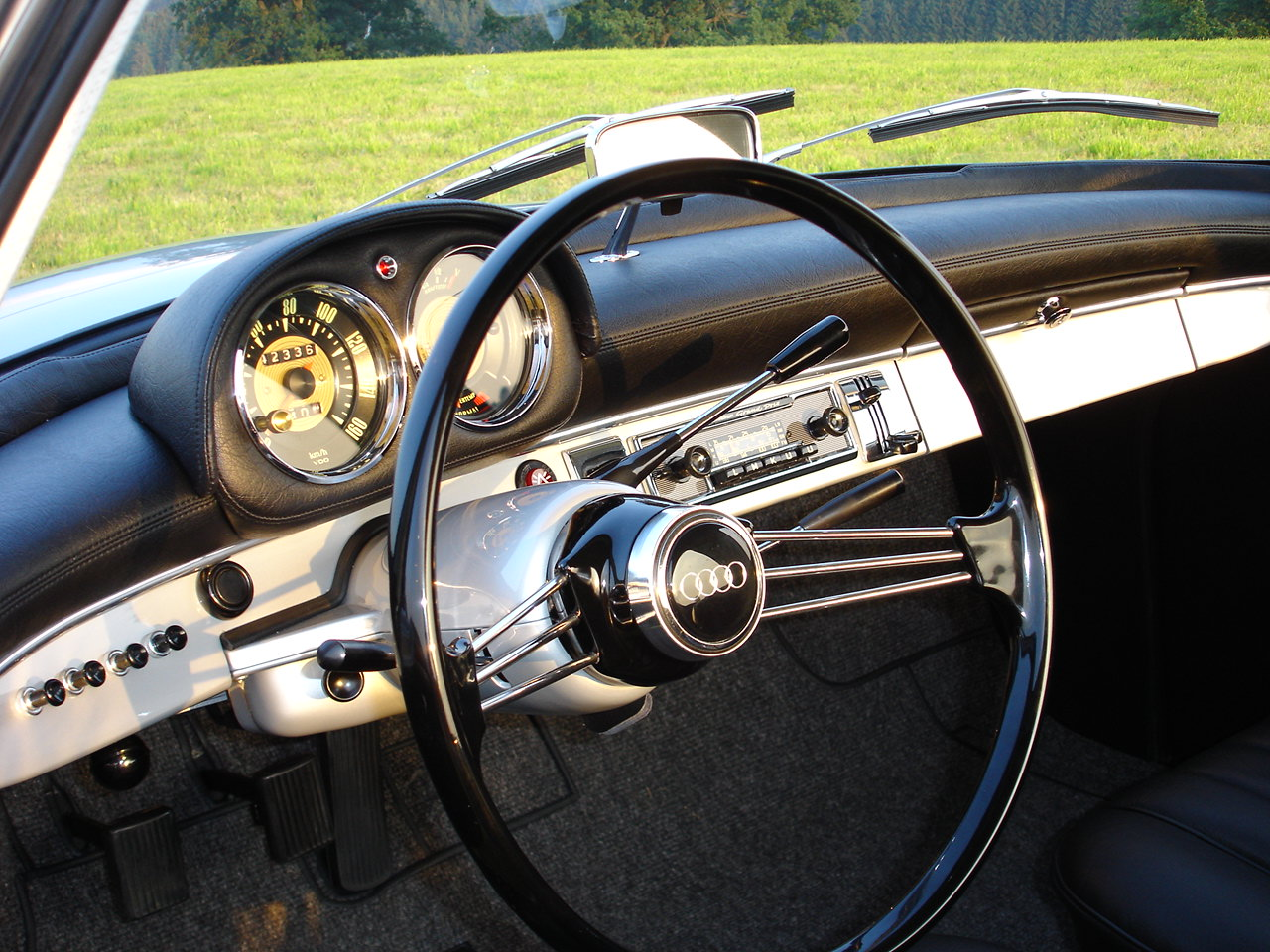 DKW Monza